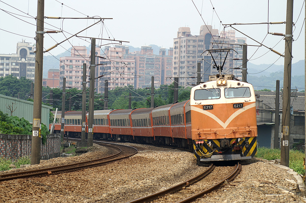 臺灣鐵路管理局電力機車E217牽引莒光號特快車，行經樹林車站。